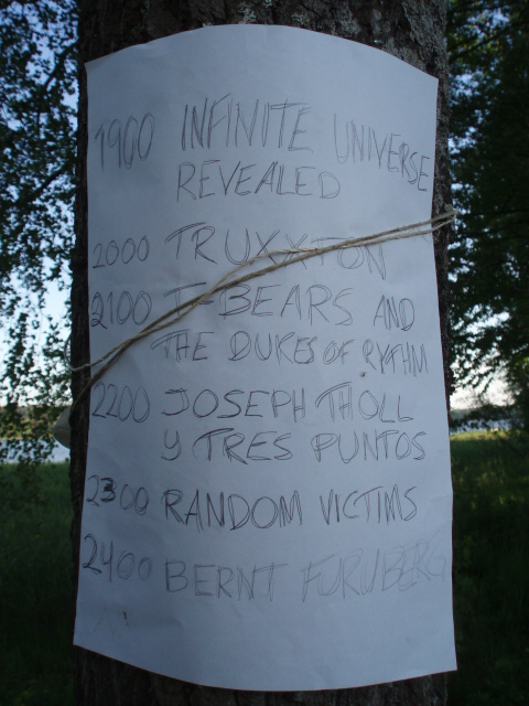 Spelschemat för Viksholmsfestivalen 2007.